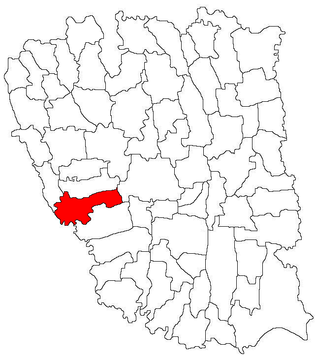 Categorie:Hărţi ale judeţului Galaţi